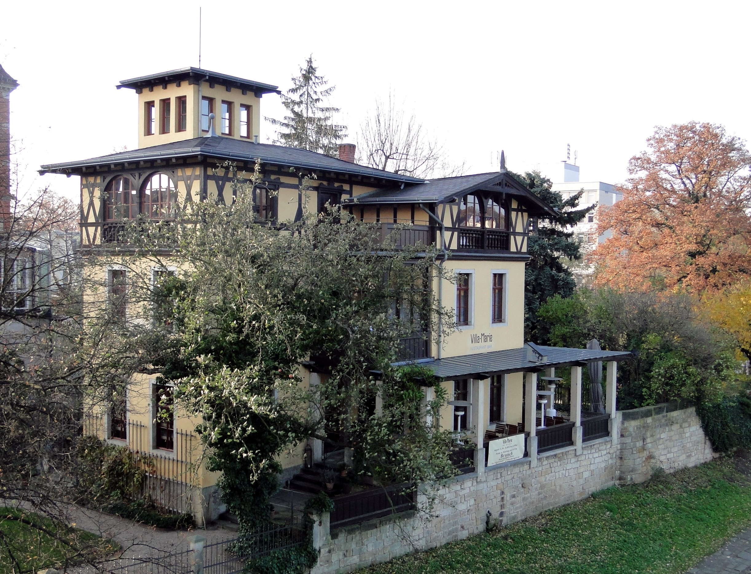 Die Villa Marie im Dresdner Stadtteil Blsewitz, Elbseite